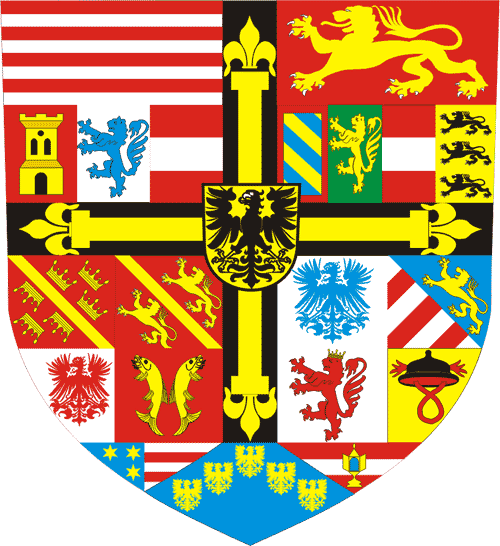 Teutonic Order - Coat of Arms of the Grandmaster Wappen des Hoch-und Deutschmeisters des Deutschen Ordens Maximilian von Österreich